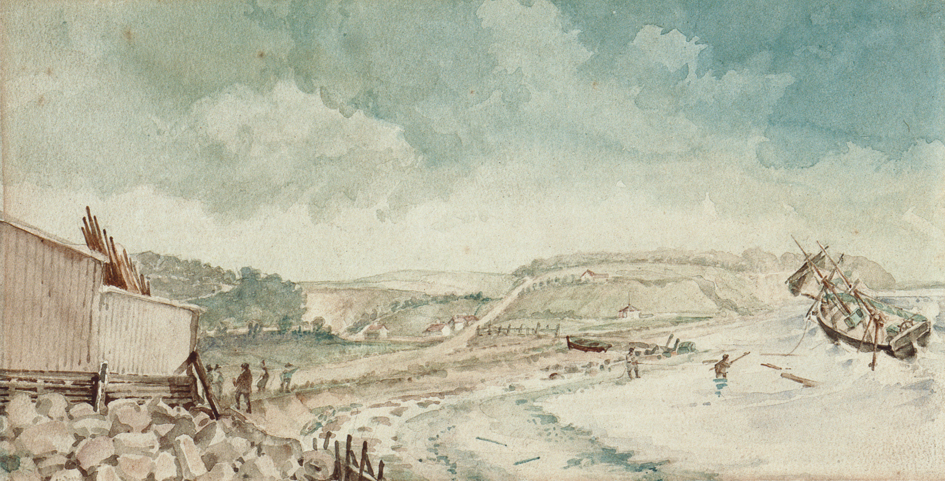 Stranding ved Meilgades Port